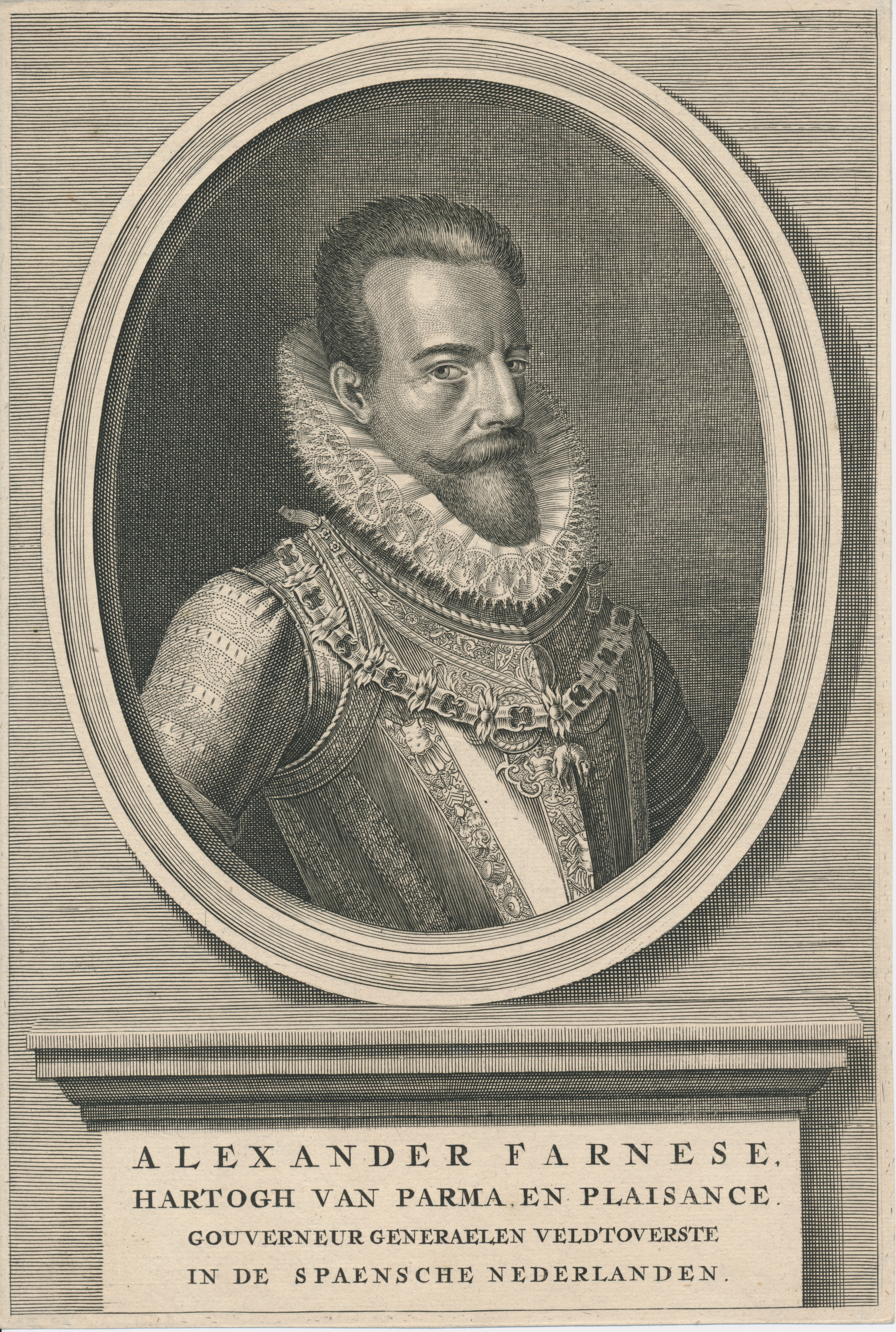 Alexander Farnese 1545-1592